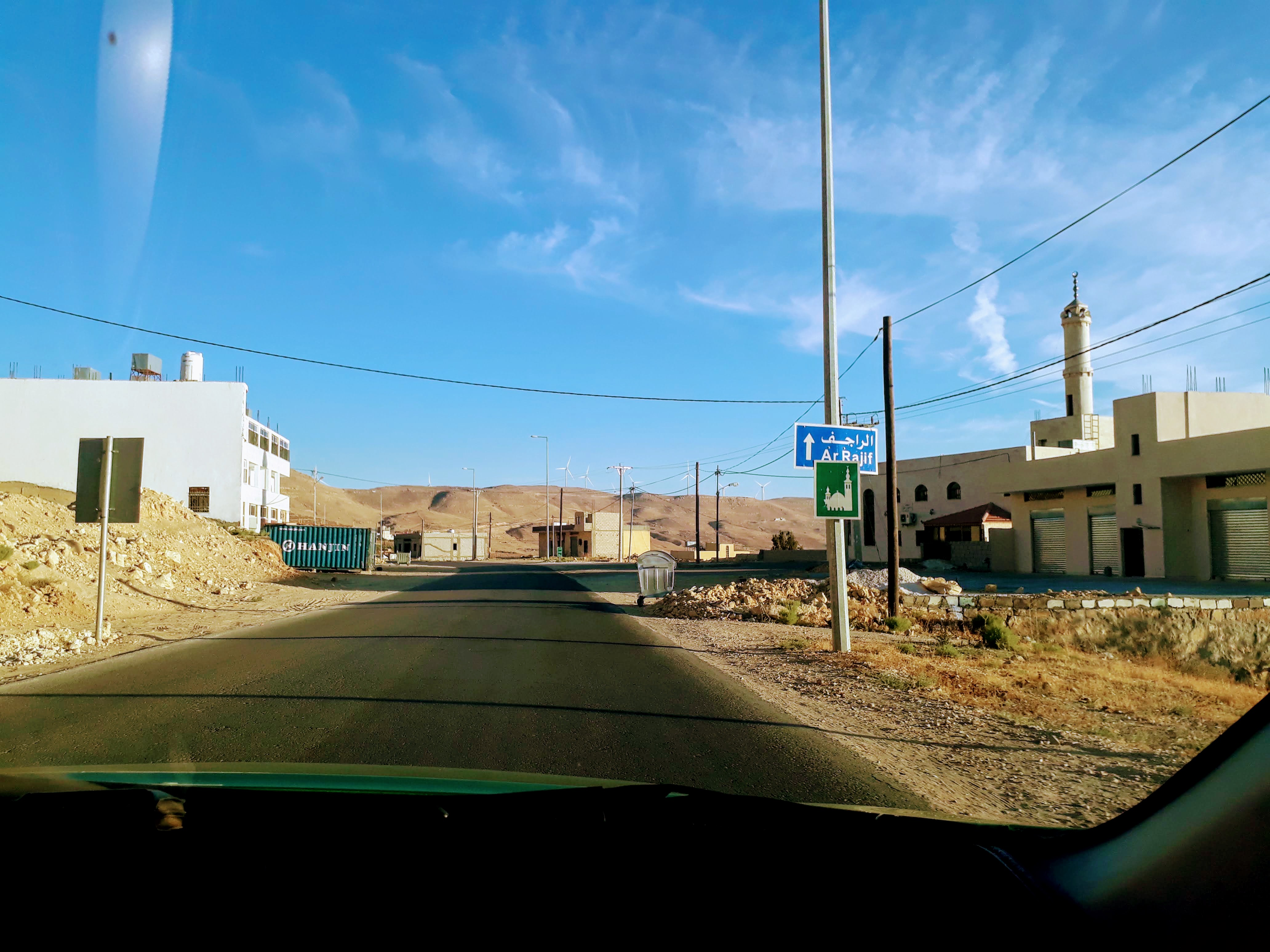 പെട്രയിലേക്കുള്ള പാതയിലൂടെ